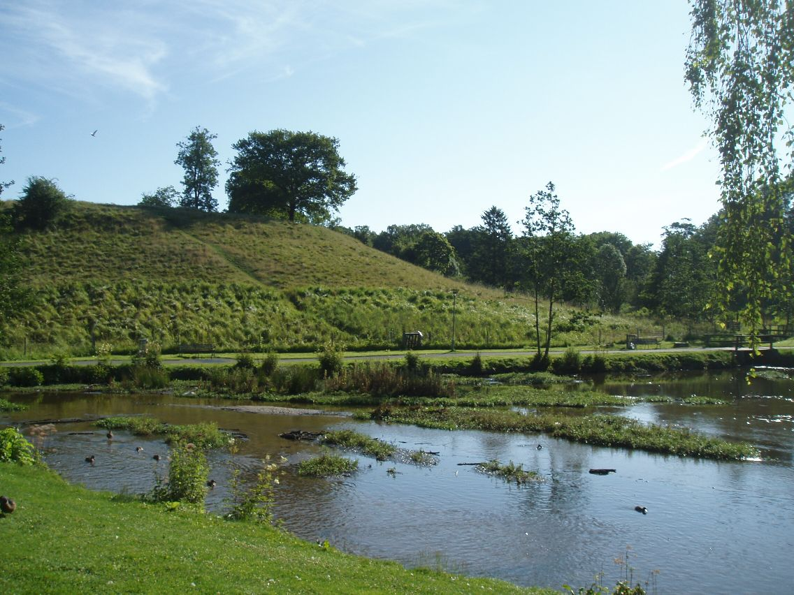 Ørkildborgen i Svendborg set fra Syd